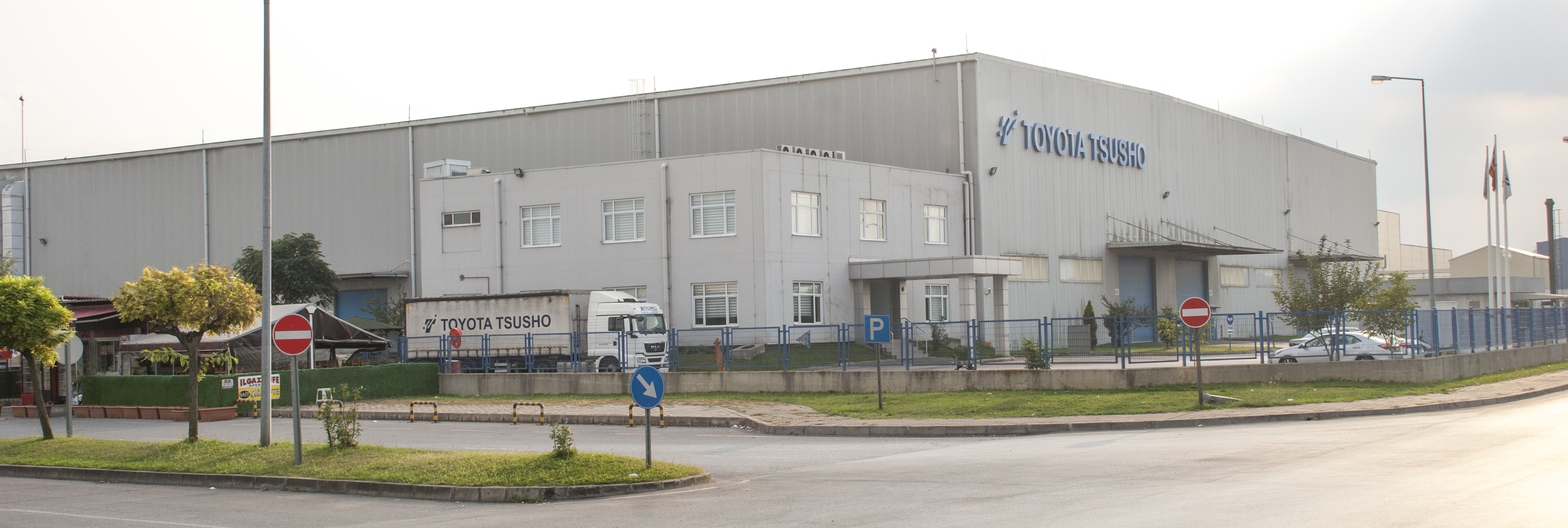 Totoyota'nın Adapazarı tesislerinden biri.